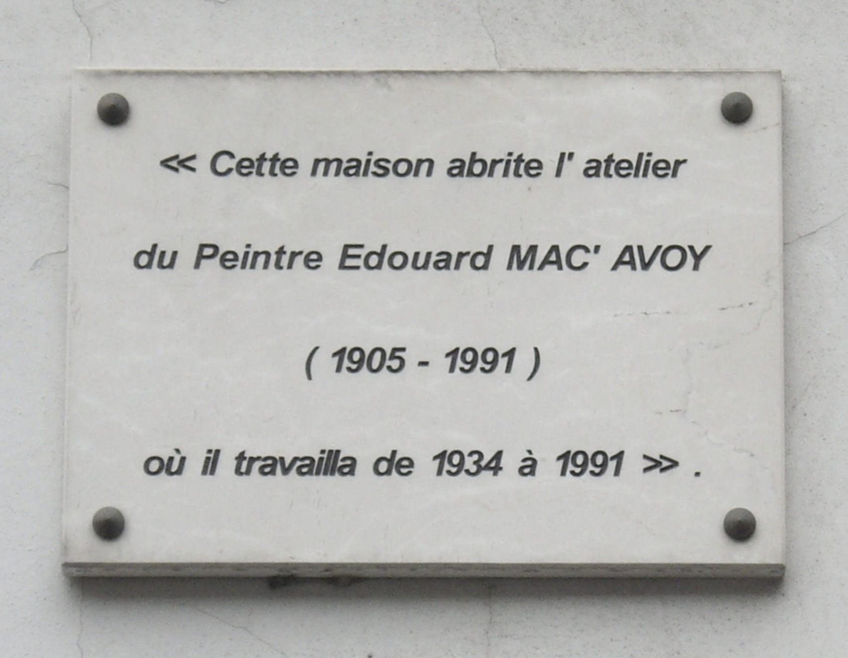 Plaque apposée au n° 102 de la rue du Cherche-Midi, Paris 6e, où se trouvait l'atelier du peintre Édouard-Georges Mac-Avoy (1905-1991) et où il travailla de 1934 à 1991.